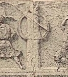 Relief mit einem Tropaion (Ausschnitt), Heroon von Gjölbaschi-Trysa, Innere Westwand, Feldschlacht zwischen Schiffslager und Troja, Steine A4-A5. Tropaion an der Steinfuge zwischen A4 und A5. Beschreibung: Otto Benndorf: Das Heroon von Gjölbaschi-Trysa, [1]. In: Jahrbuch der Kunsthistorischen Sammlungen in Wien, Jahrgang 9, 1889, Seite 1-134, hier: 119, pdf. Siehe auch: File:Relief mit einem Tropaion, Heroon von Gjölbaschi-Trysa.jpg.